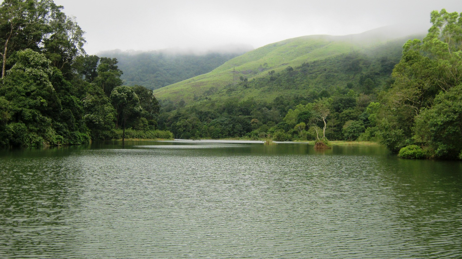 Misty Pamba Dam @ Gavi